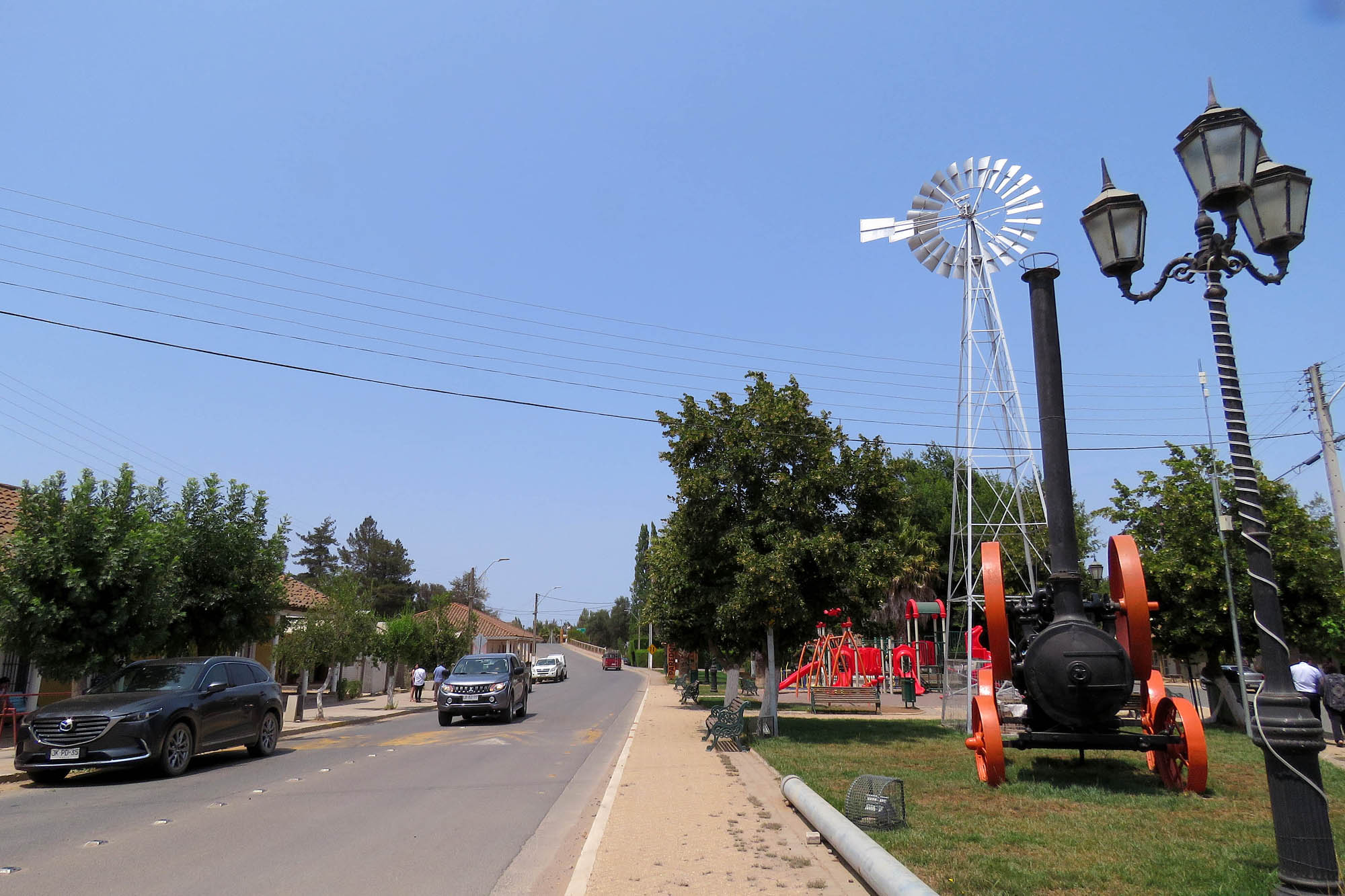 Calle principial de Paredones, Sexta región O'higgins, Chile